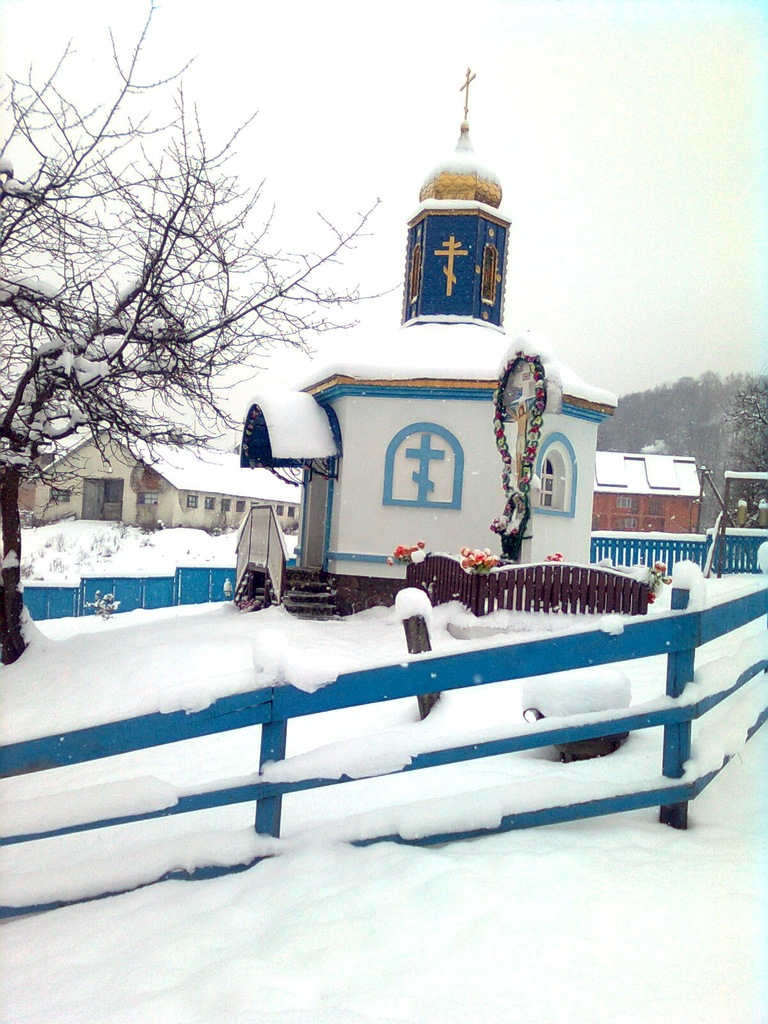 Капличка в селі Крива, Тячівського району